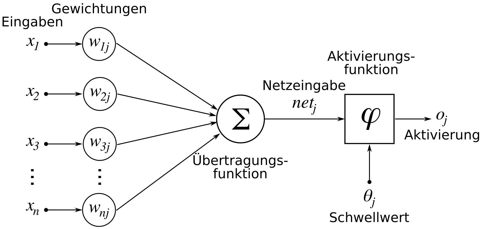 Schema eines künstlichen Neurons: Künstliches Neuron mit Index j